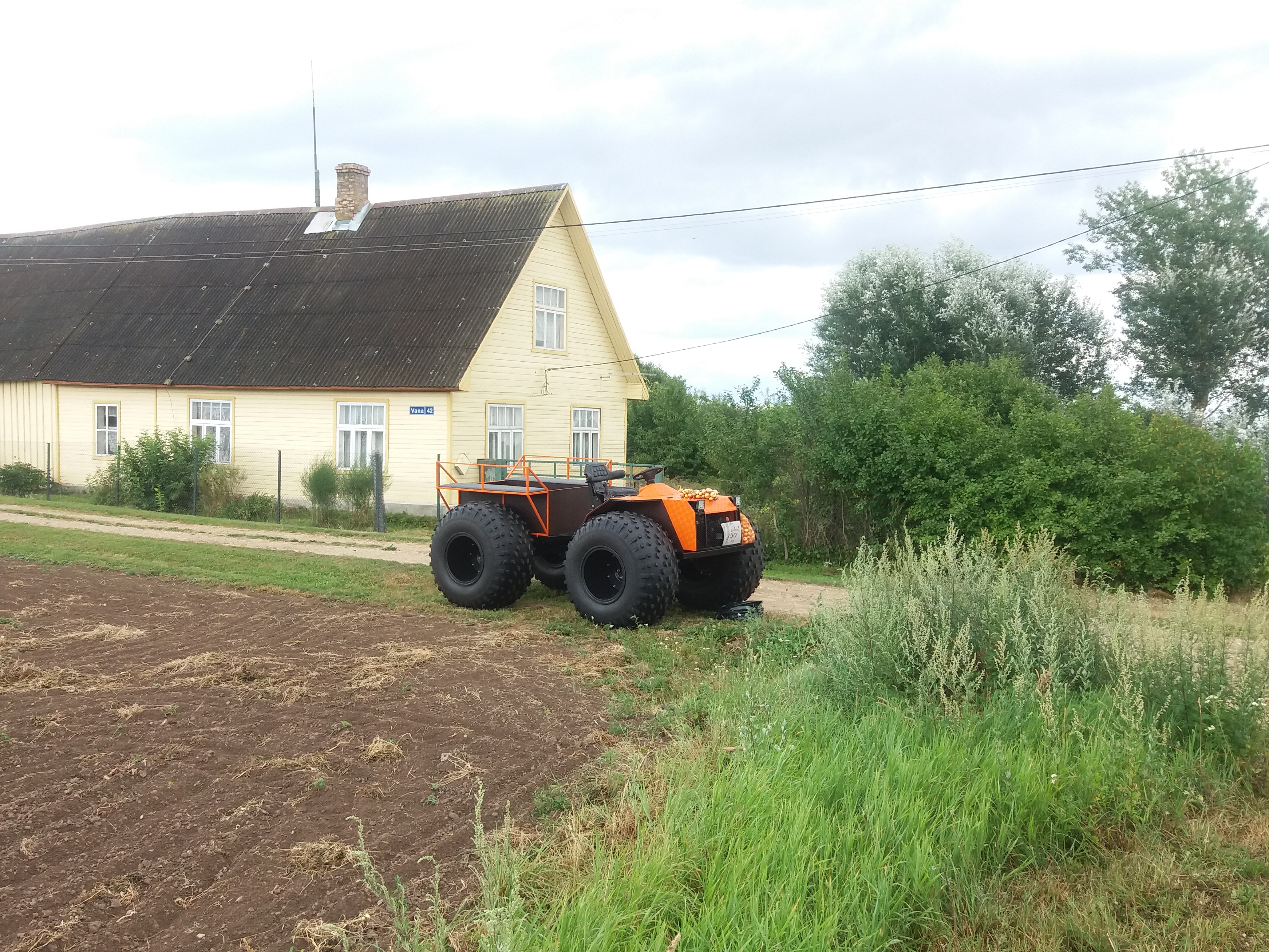 Karakatitsa Lüübnitsas 2018